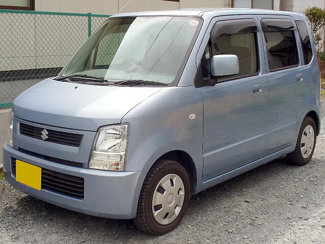 スズキ・ワゴンR（3代目前期型・フロント）